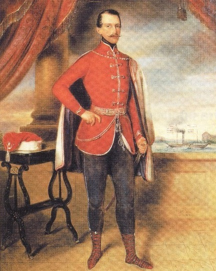 Ambroz Vranyczany.